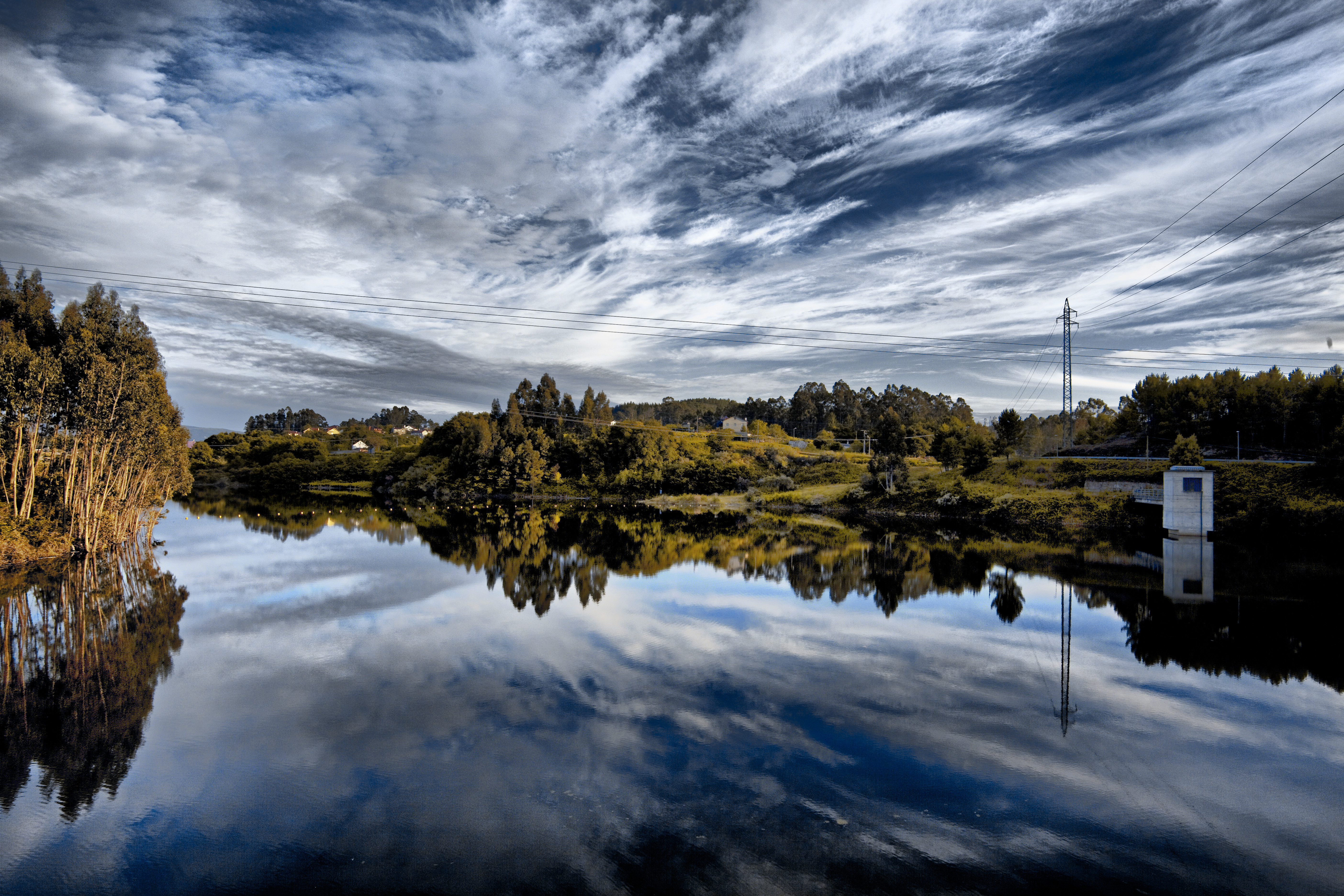 Encoro do rio Umia Umia. A Baxe, Santo André de Cesar, Caldas de Reis.